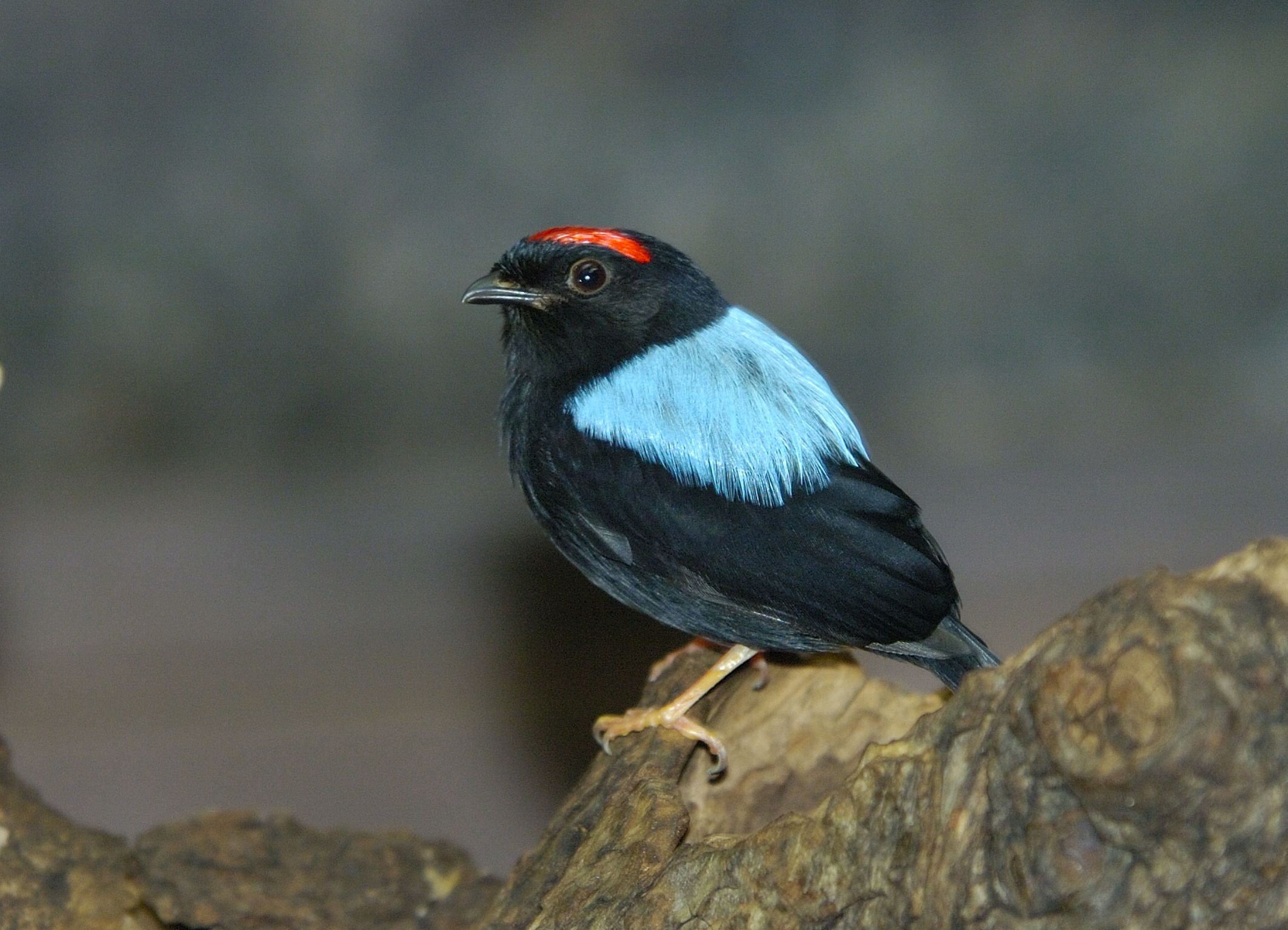 Prachtpipra (Chiroxiphia pareola) im Tiergarten Schönbrunn, Wien, Österreich